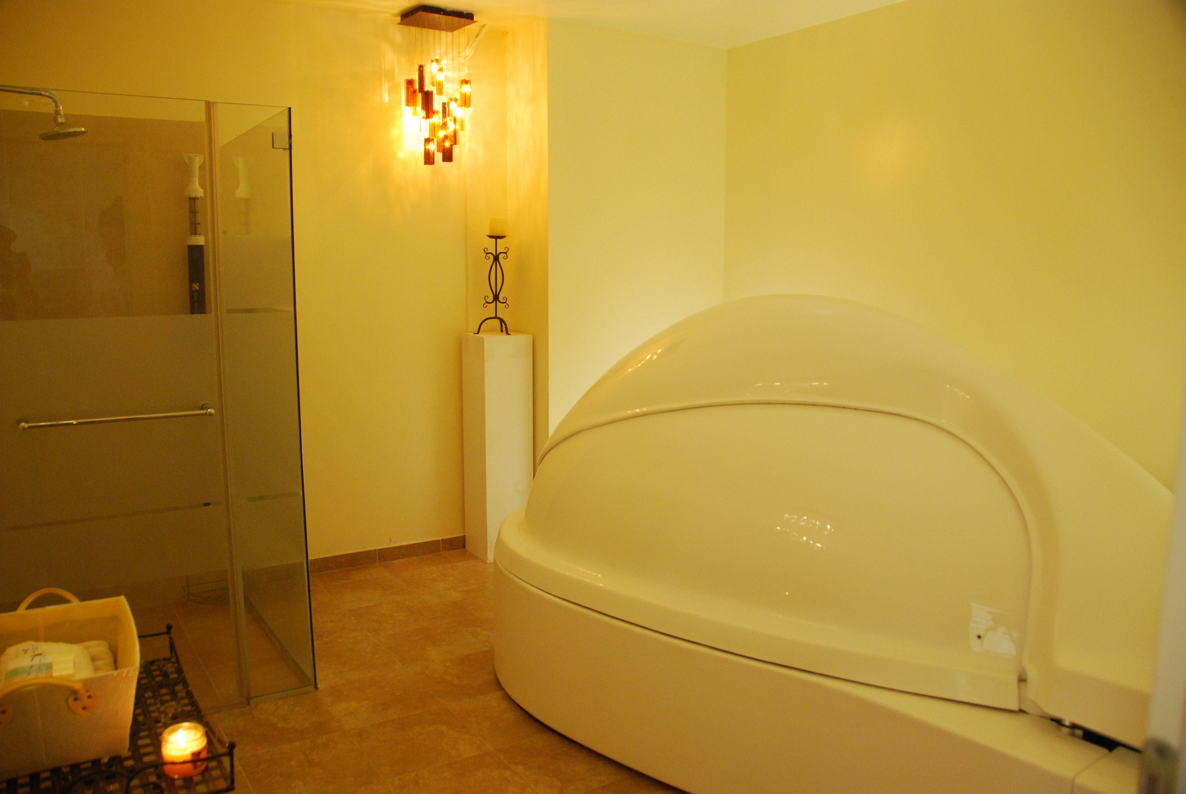 תמונת חדר ציפה במרכז גלים. בחדר, בריכת ציפה למטרות התרגעות עמוקה ושחרור מתחים וכאבים.